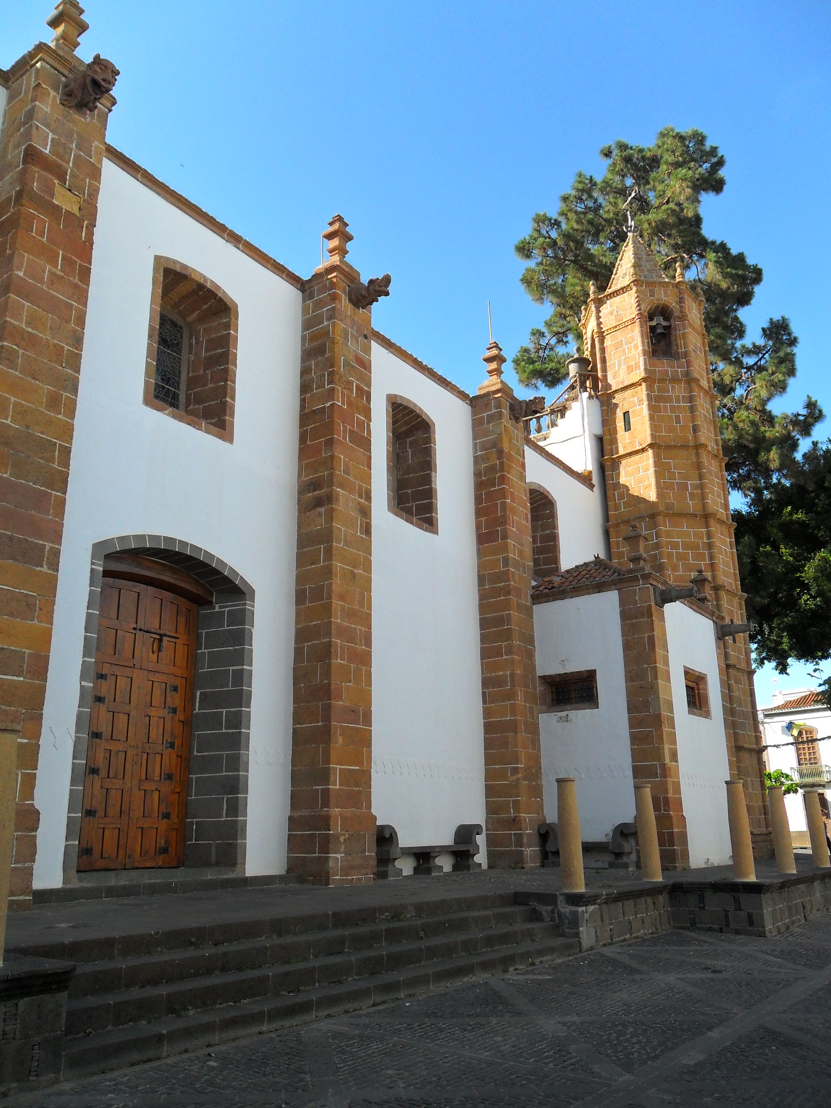 Basílica de Nuestra Señora del Pino